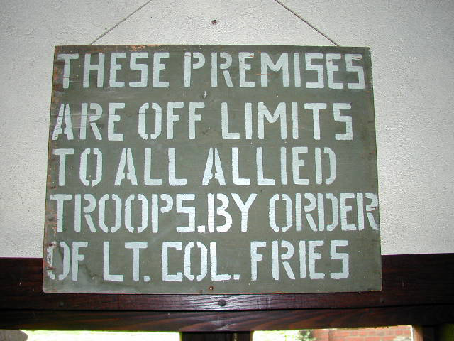 Lieutenant Colonel Fries von den englischen Besatzungstruppen stellt die Körtzinger-Werkstatt unter seinen Schutz.